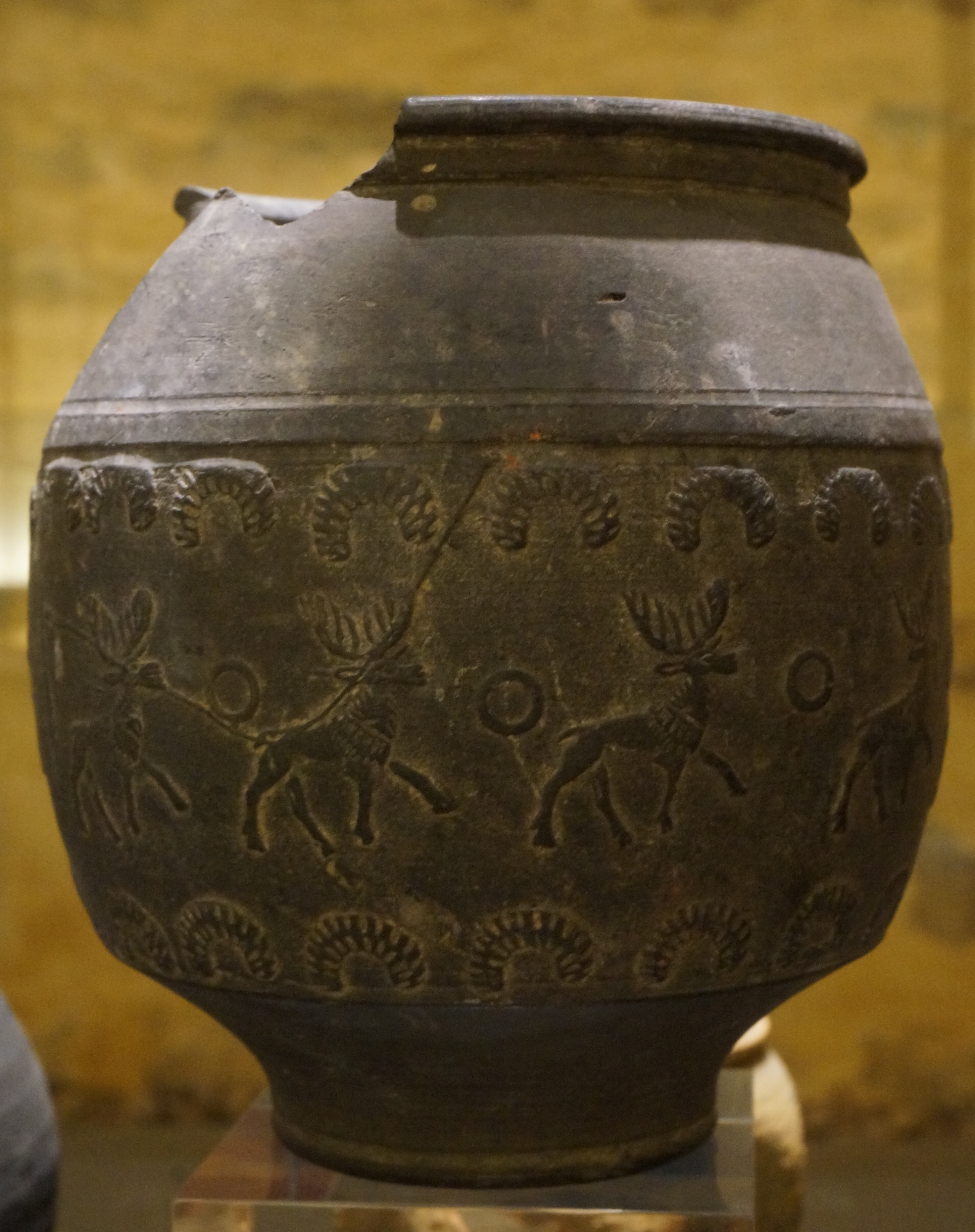 Visible au muse de l'Ardenne .